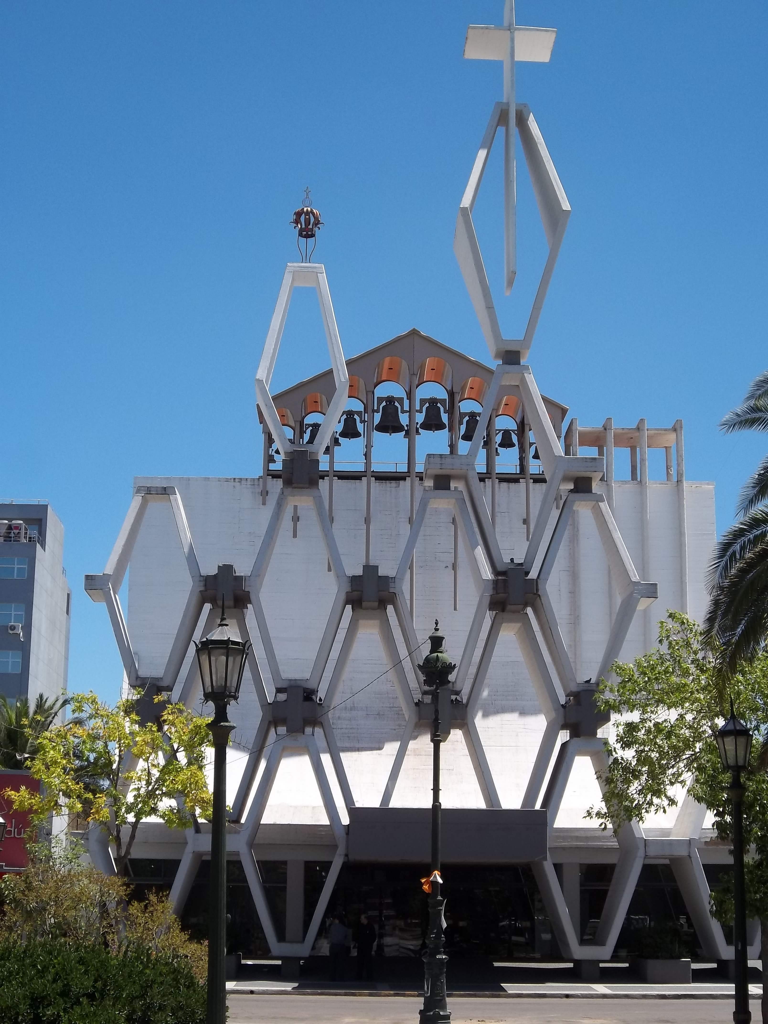 Catedral Santa Rosa de Lima en Santa Rosa, provincia de La Pampa, Argentina.